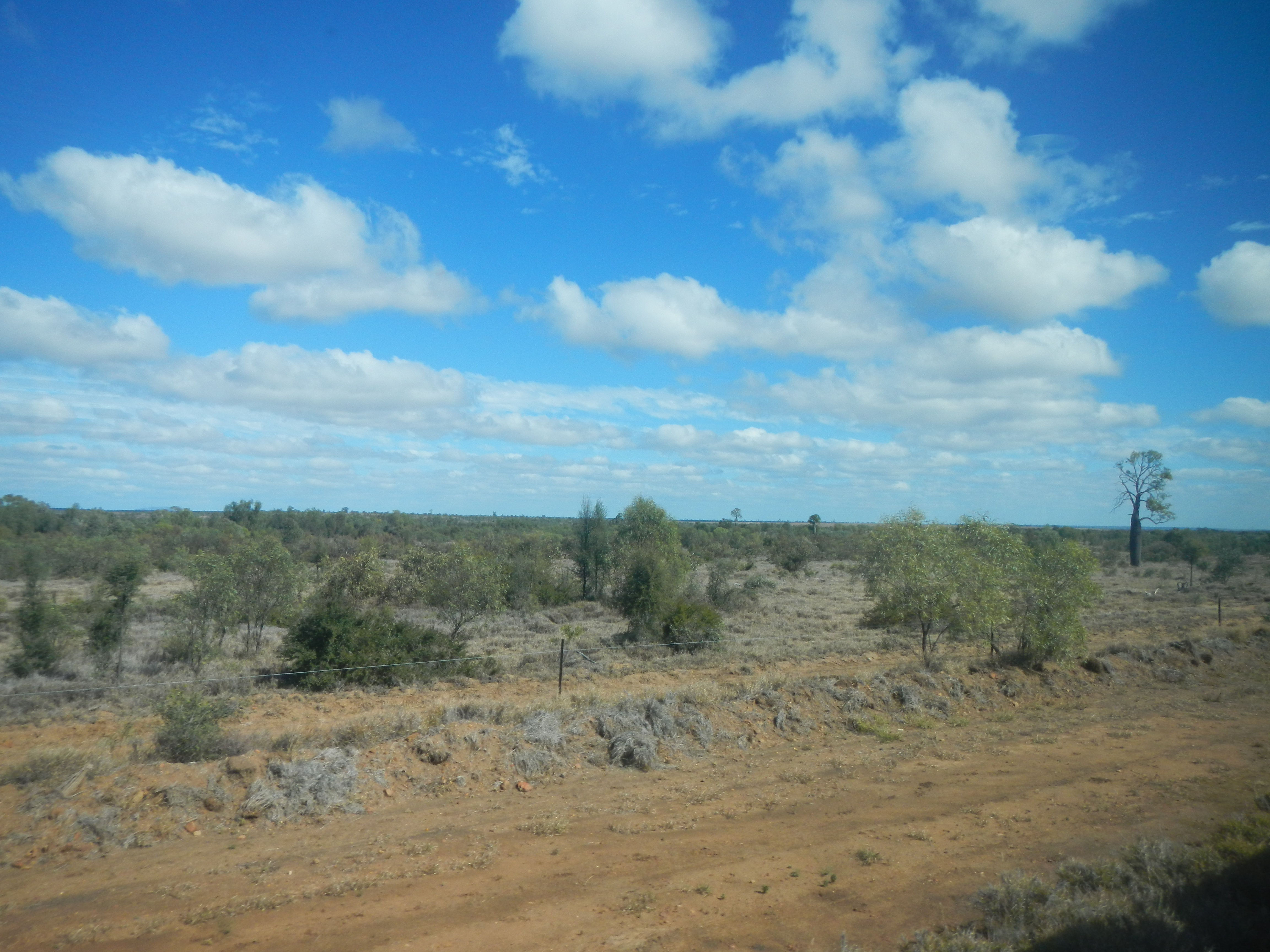 Outback Grazing Land